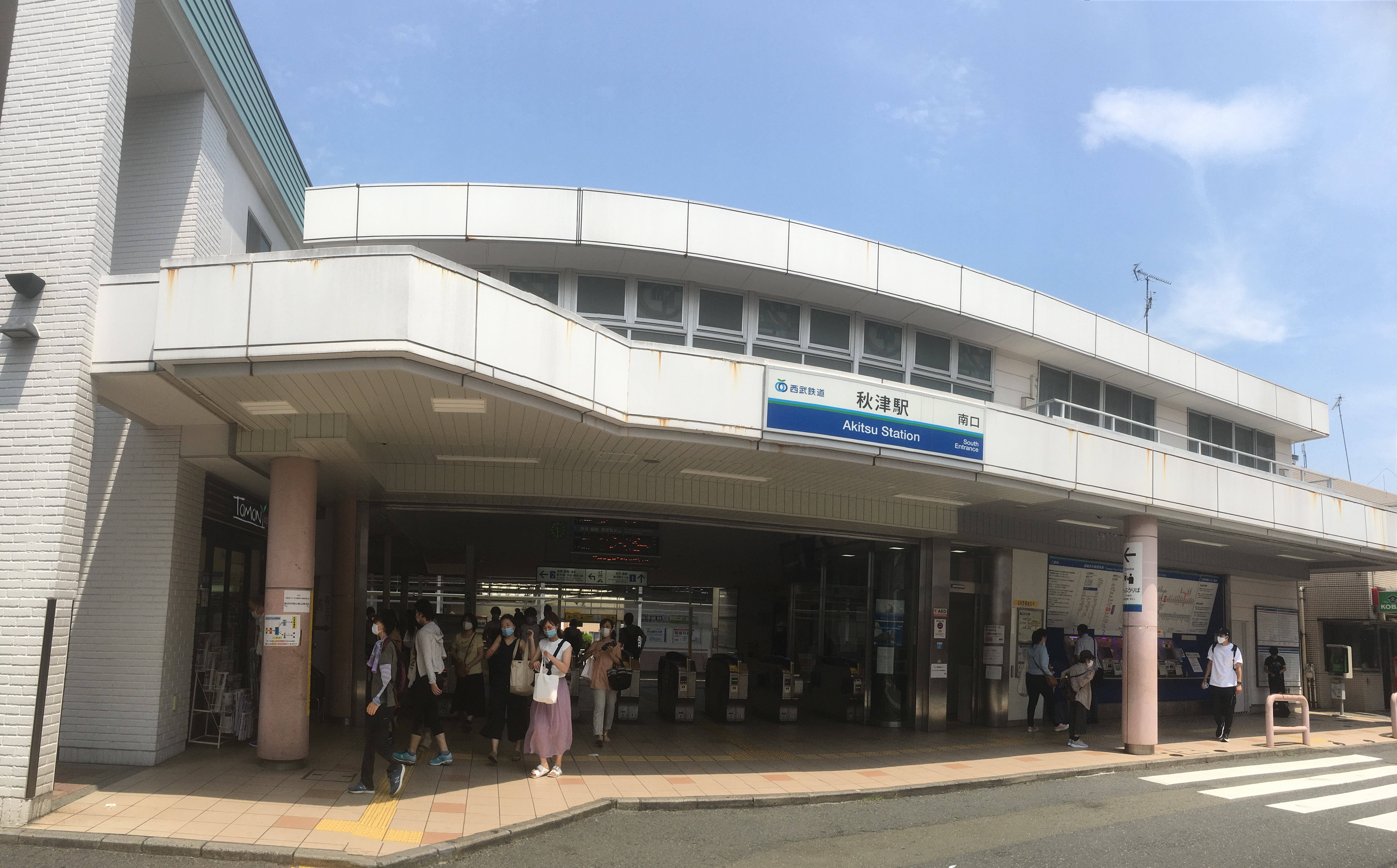 秋津駅 (Akitsu Station)